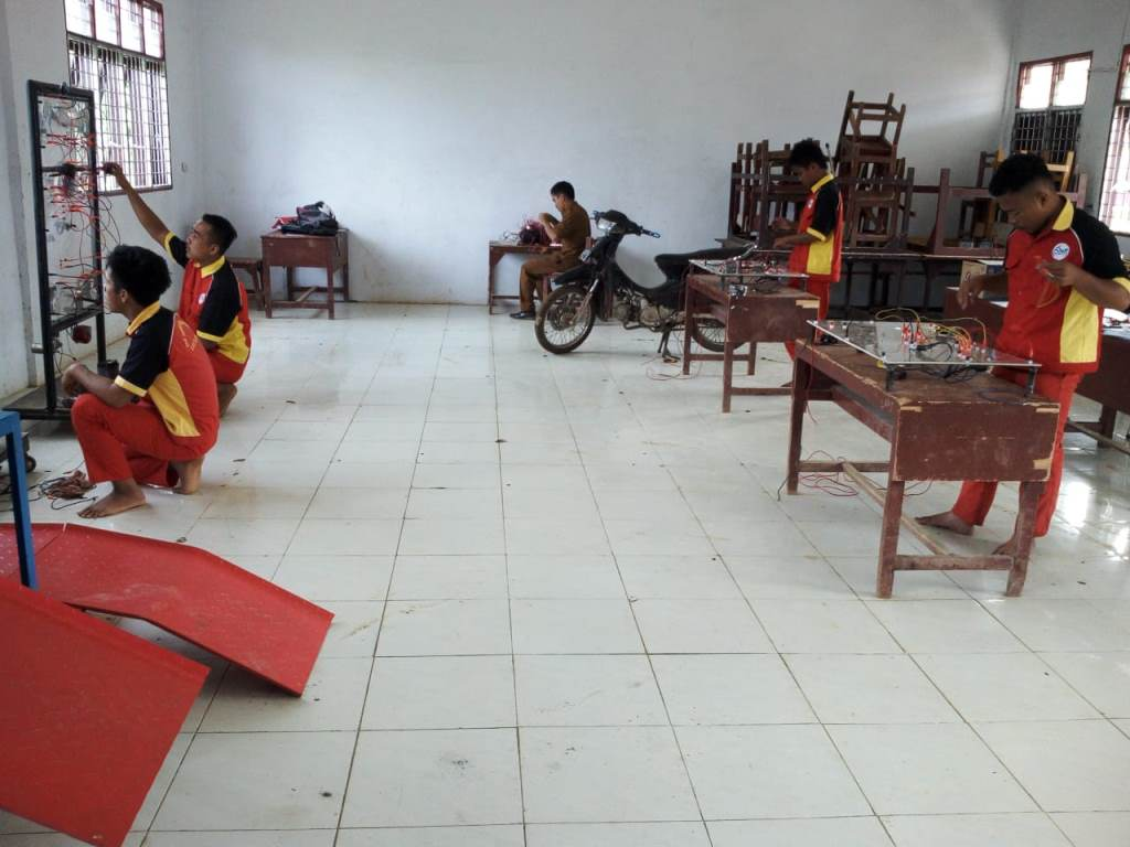 Kegiatan praktek Peserta Didik di bengkel sepeda motor